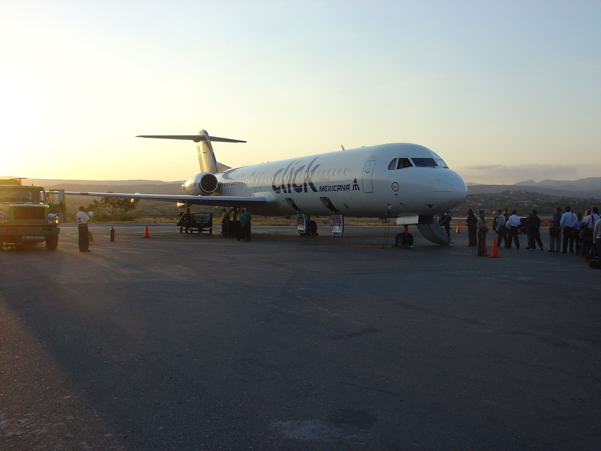 Aeronave en el aeropuerto